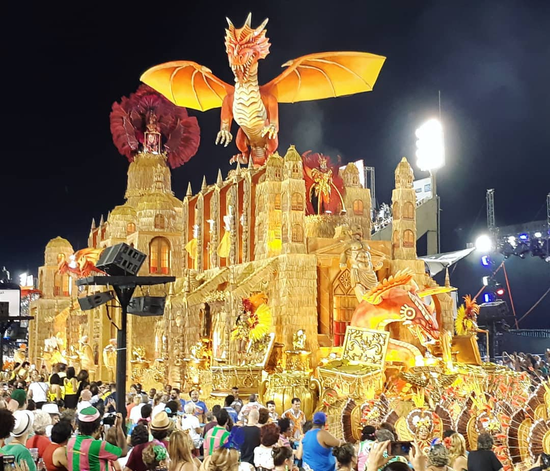 Desfile das escolas de samba do Rio de Janeiro, 2019